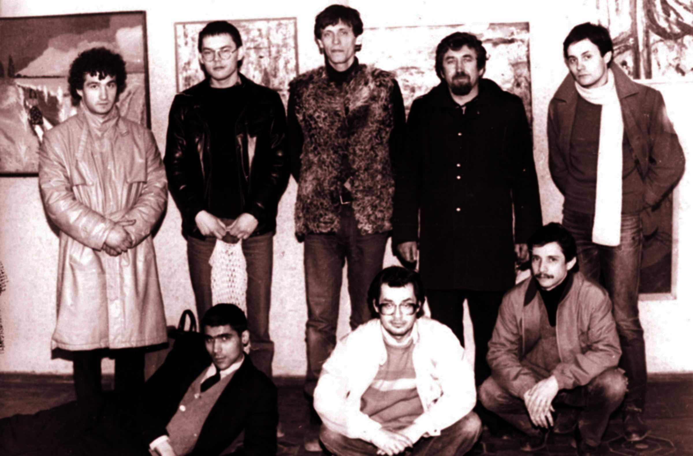 Фотография на "Однодневной выставке" будущего товарищества "Искусство или смерть", Таганрог, ДК з-да "Прибой", 19.03.1988. Слева направо стоят: 1. Алексей Кузьменко, художник; 2. Василий Слепченко, художник; 3. Николай Константинов, художник; 4. Александр Токарев, искусствовед, директор РХУ (1989-1997); 5. Юрий Шабельников, художник. Слева направо сидят: 1. Авдей Тер-Оганьян, художник; 2. Юрий Палайчев, художник; 3. Александр Кисляков, художник